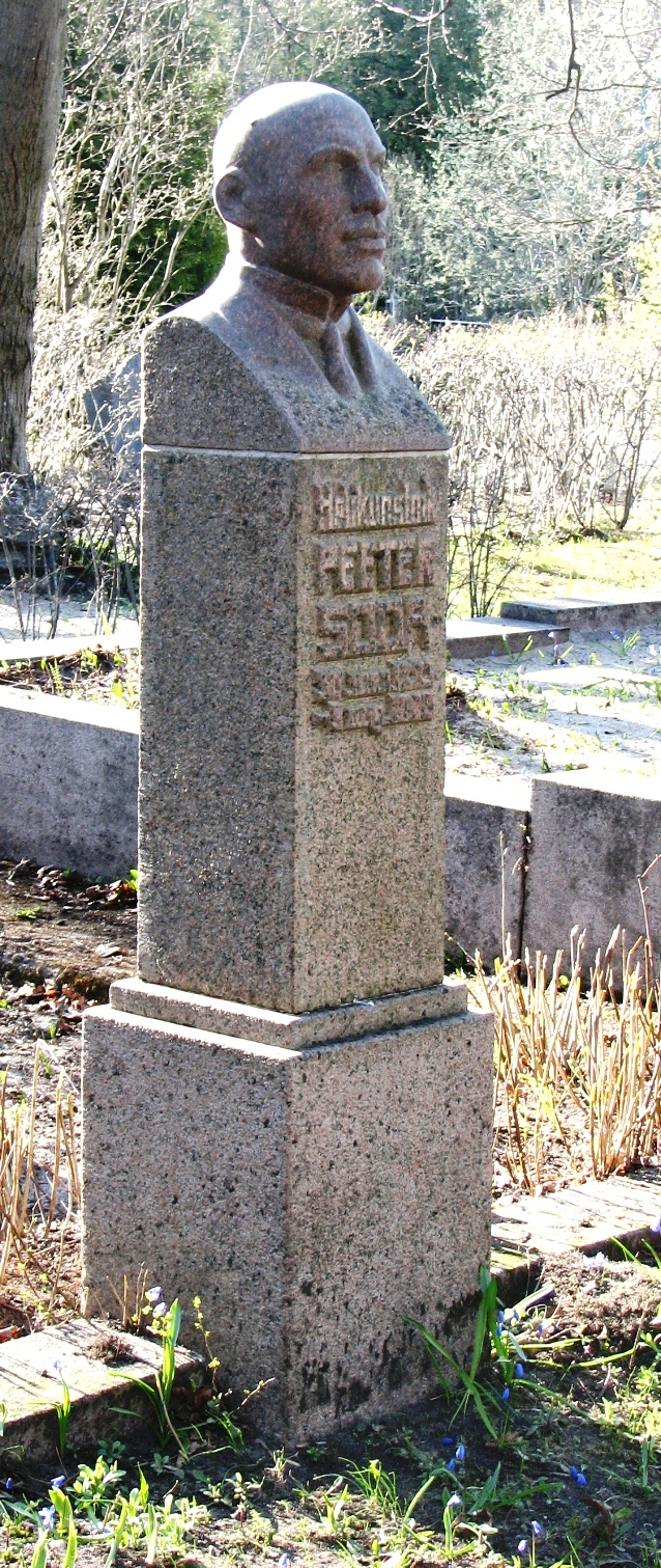 Peeter Süda haud Tallinna Siselinna kalmistul